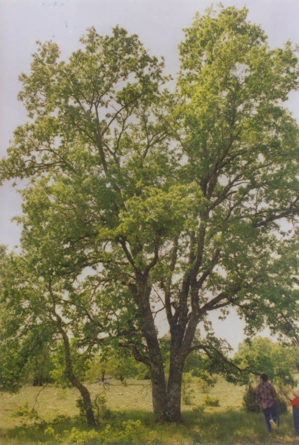 Una Quercus faginea centenaria, en Torrecuadrada de los Valles, Guadalajara, España.